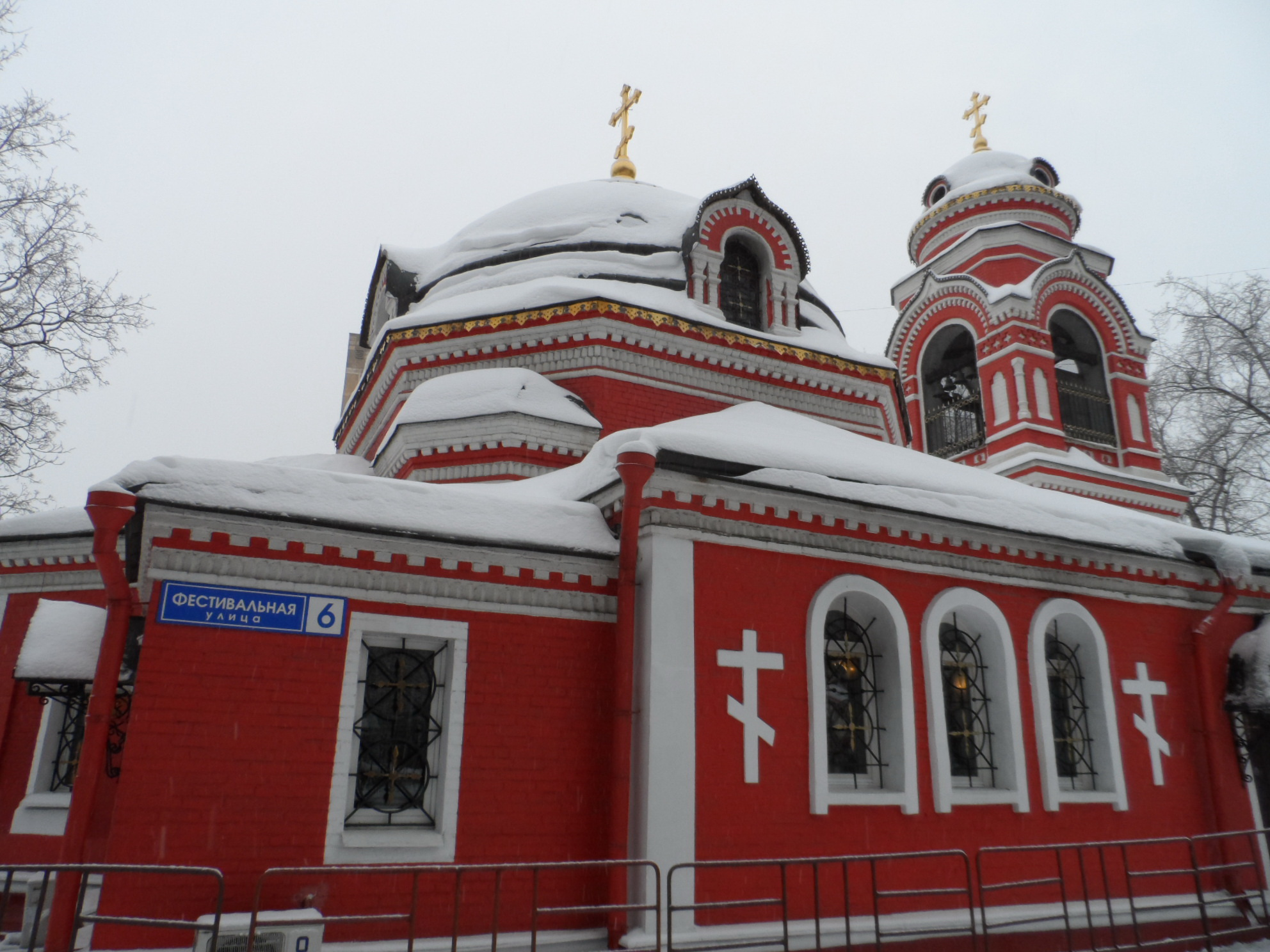 Церковь иконы Божией Матери «Знамение» в САО города Москвы (бывшее село Аксиньино). Адрес - Фестивальная улица, дом 6. Построена в 1884 году